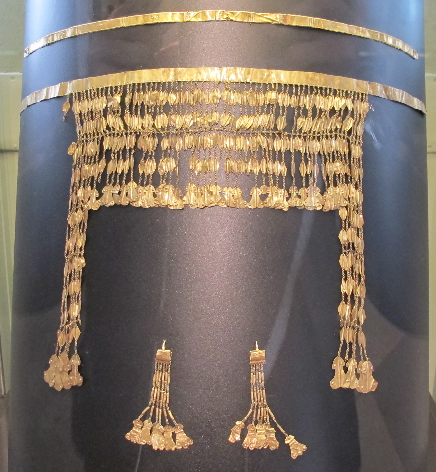 Tesoro di priamo, nastro d'oro, cat. 12; piccolo diadema con pendenti, cat. 11; due orecch. con pendenti, cat. 15-16